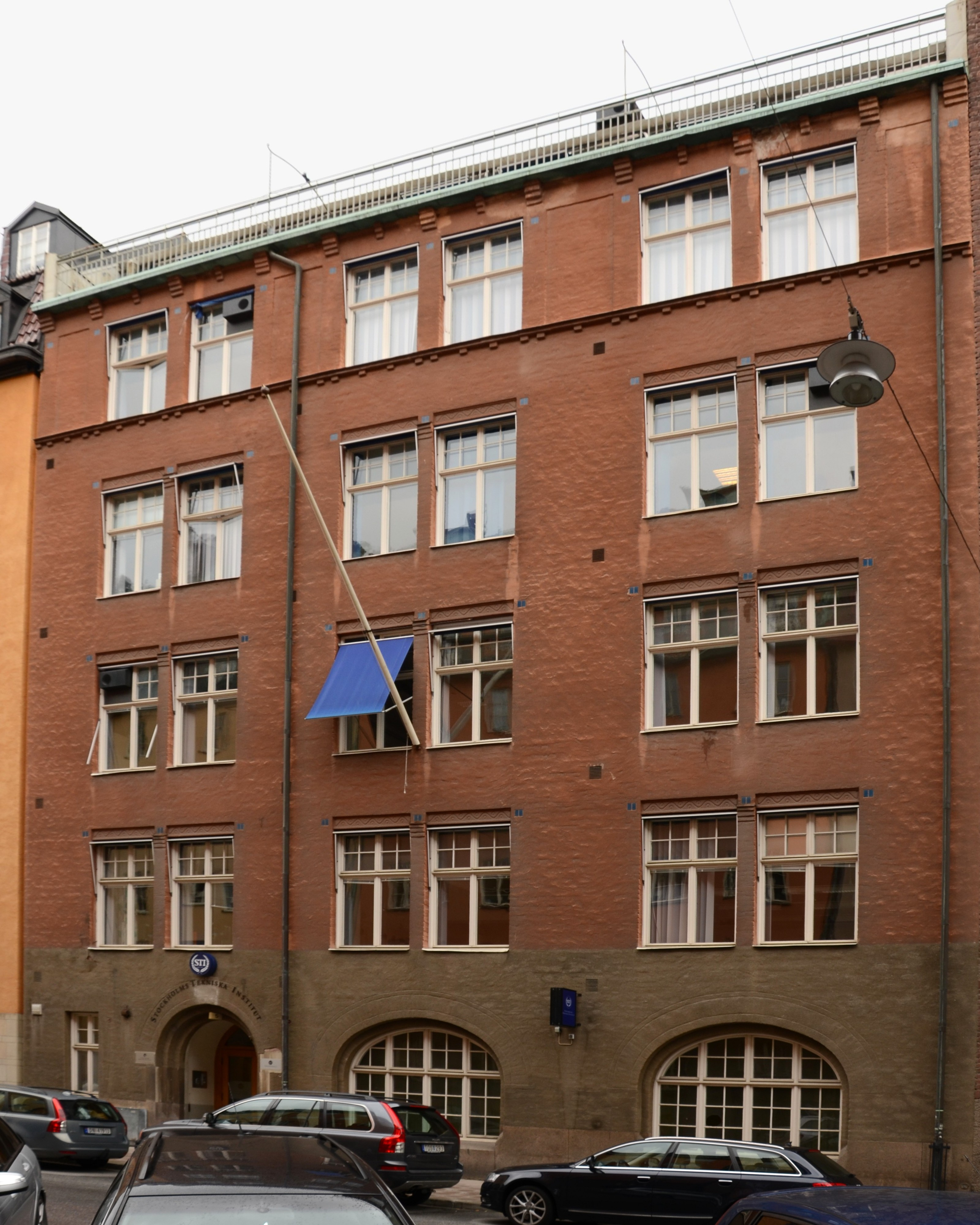 Stockholms tekniska institut. Byggnaden uppförd 1913–1914 för Margaretaskolans "Kindergarten och Seminarium". Arkitekt Rudof Enbom.